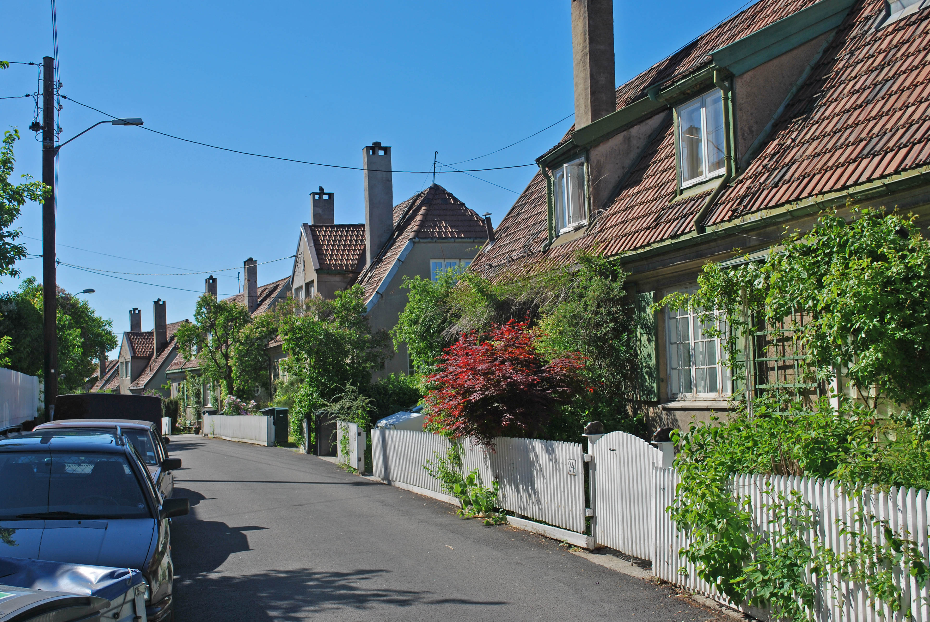 Ekeberg hageby, ofte kalt Arctanderbyen, her Erlings gate, Oslo